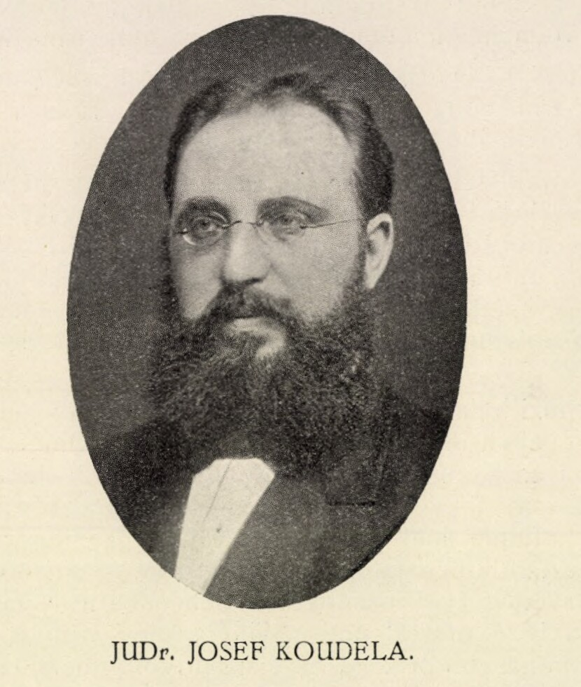 Z těžkých dob Prostějova Díl IV, str. 71